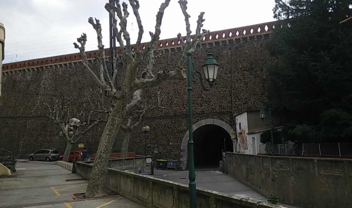 Capdamunt del carrer de Domènec Mitjavila i túnels de l'estacio de Cervera de la Marenda